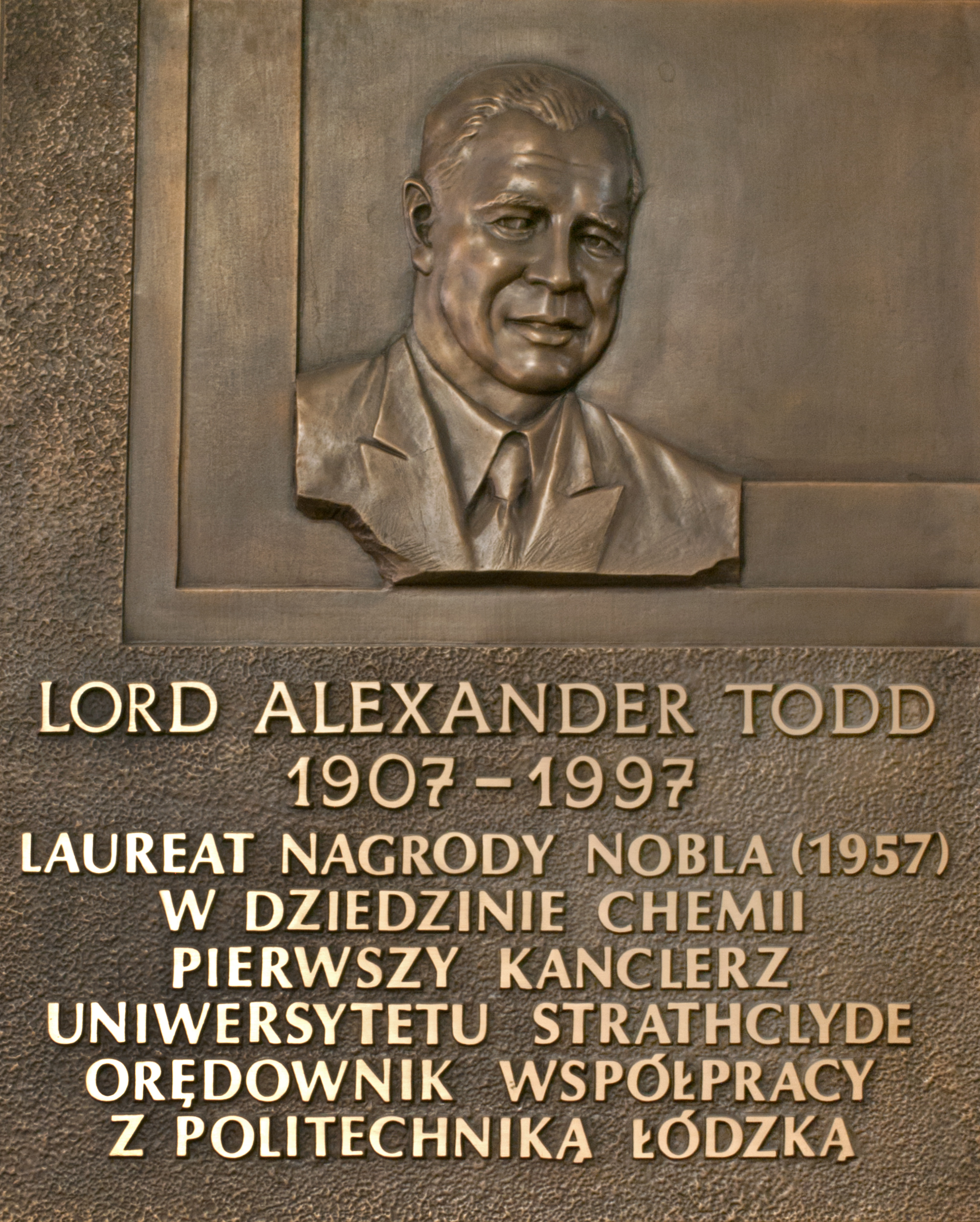 Tablica pamiątkowa prof. Aleksandra Todda